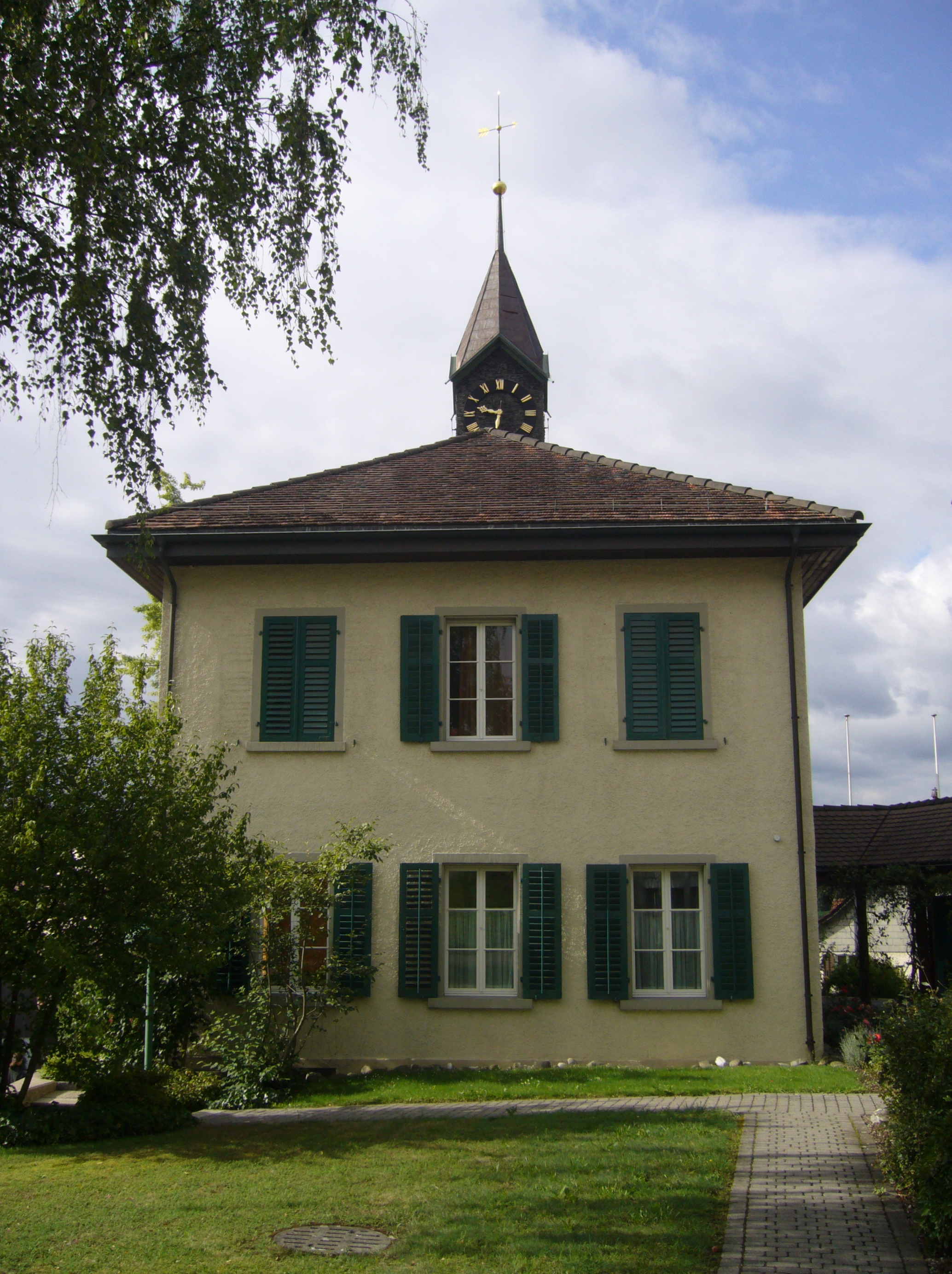 Ehemaliges Schulhaus Nürensdorf.